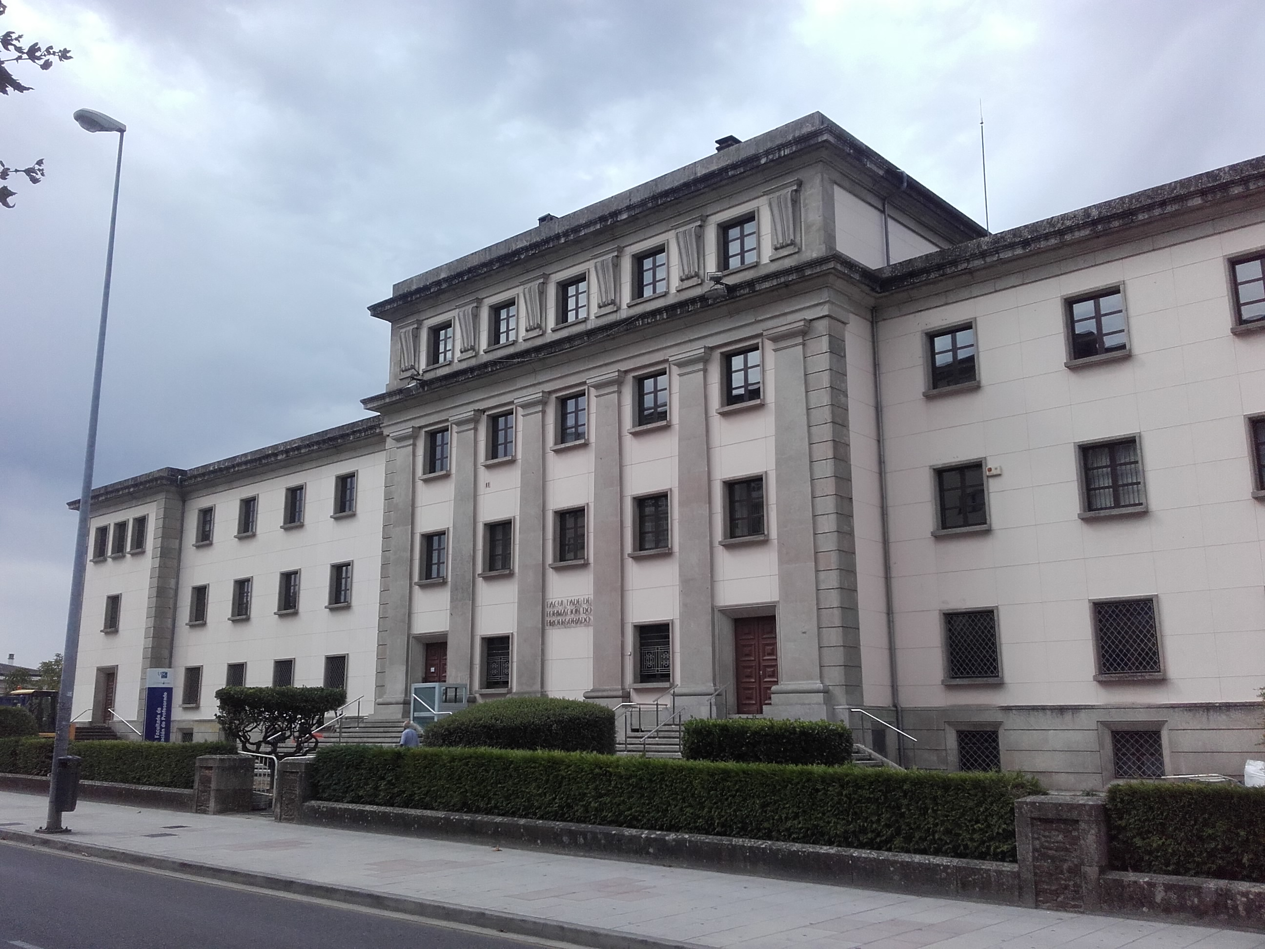 Facultade de Formación do Profesorado de Lugo..